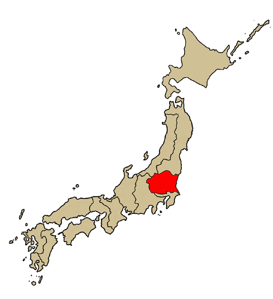 Mappa della diocesi cattolica di Saitama, in Giappone. Lavoro personale.